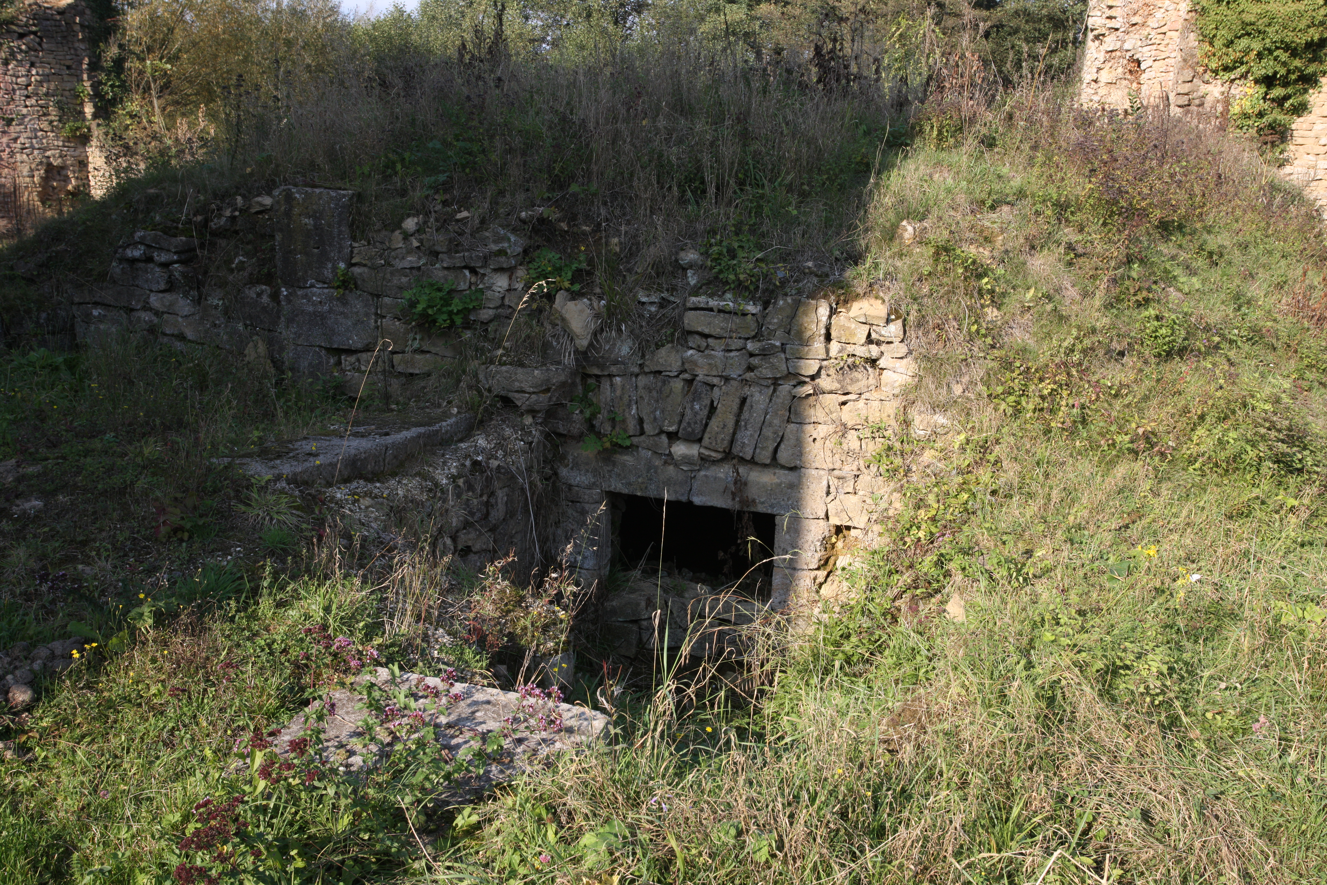 Château d'Auflance, (Inscrit, 1991) .